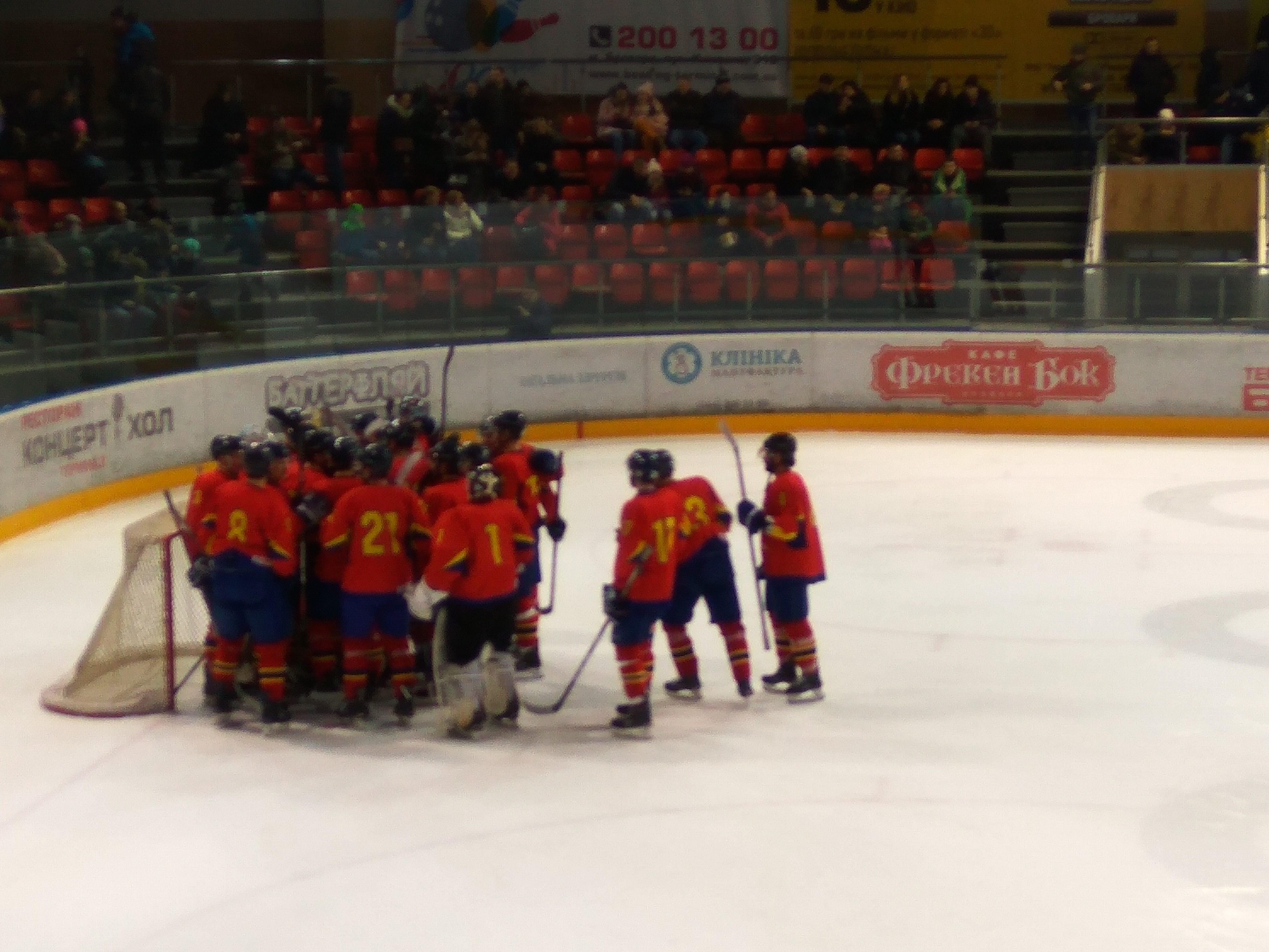 10.02.2019 Україна - Румунія 0:3